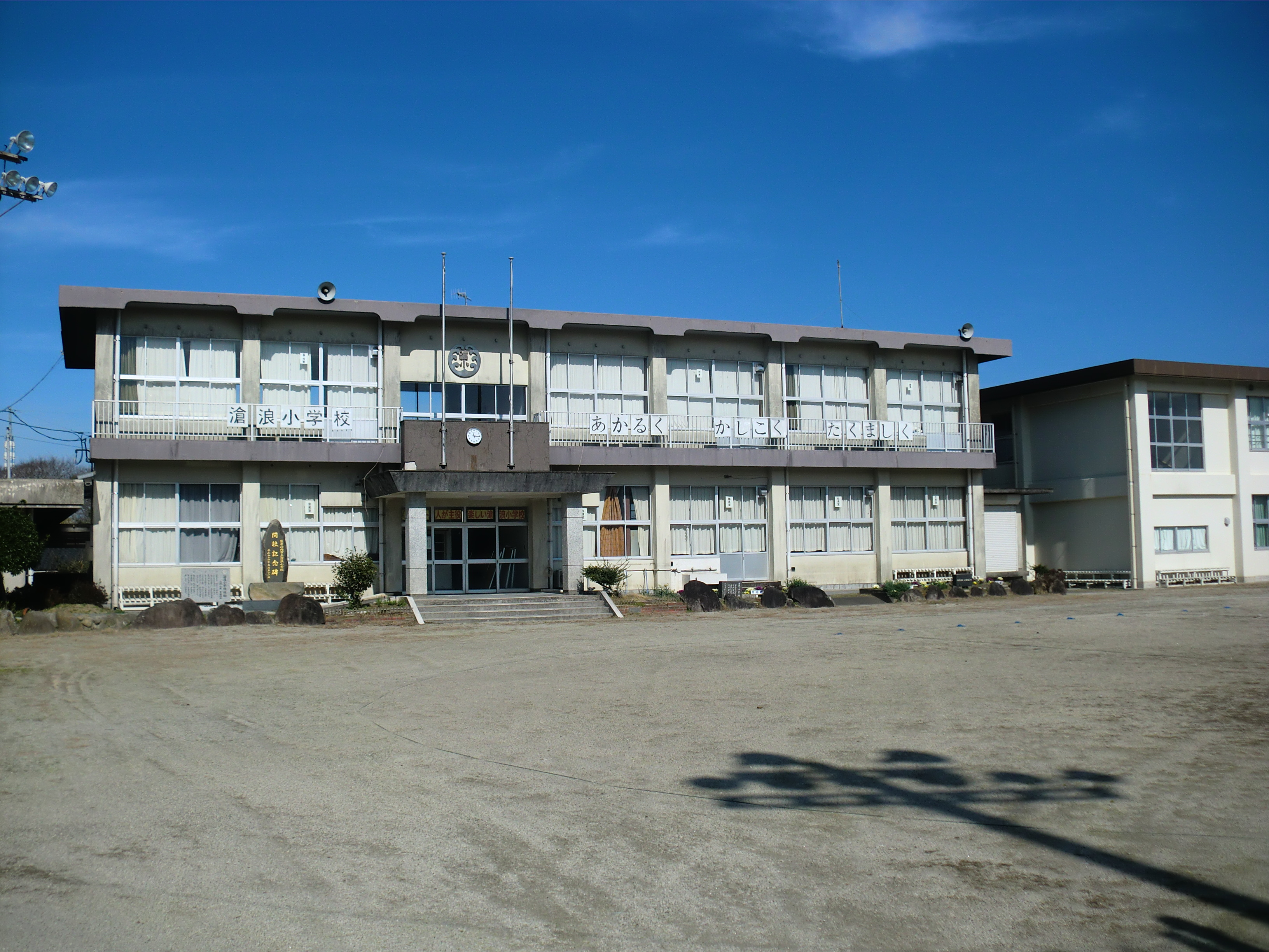 薩摩川内市にあった薩摩川内市立滄浪（そうろう）小学校